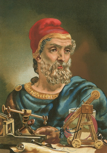 Archimede, Luis Figuier, Barcellona